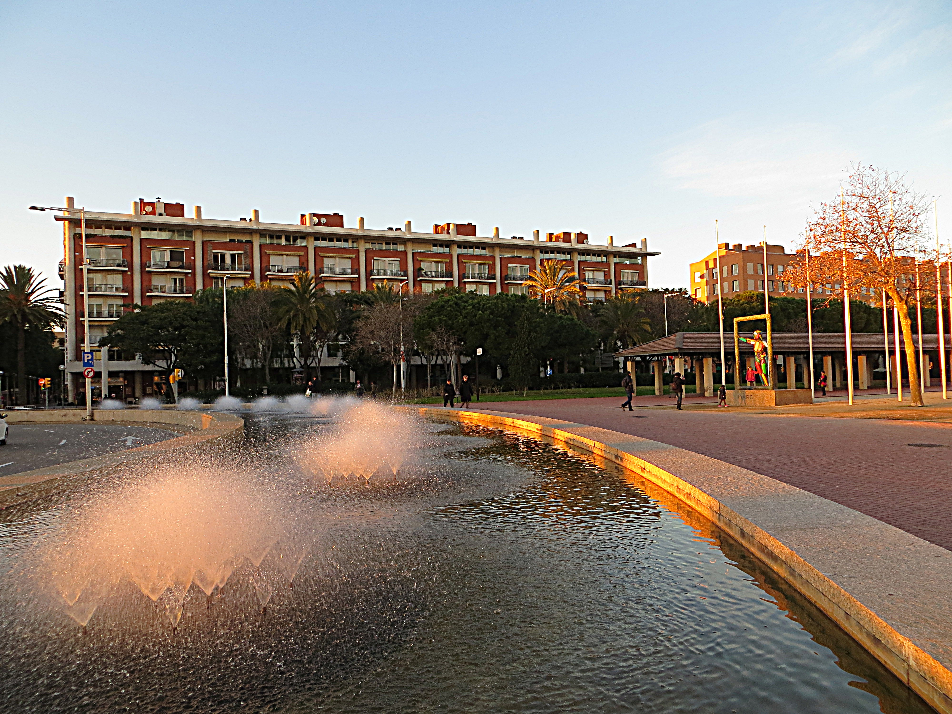 Placa dels Voluntaris Olimpics